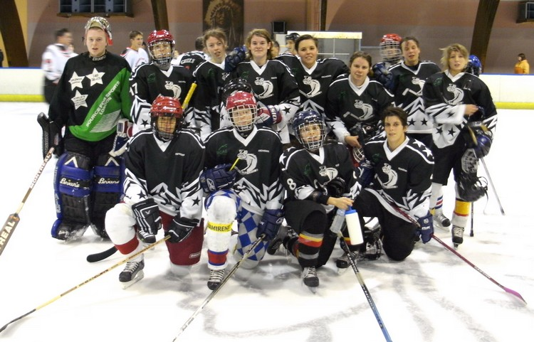 photo d'équipe réalisée lors de la rencontre face aux Devils Leest